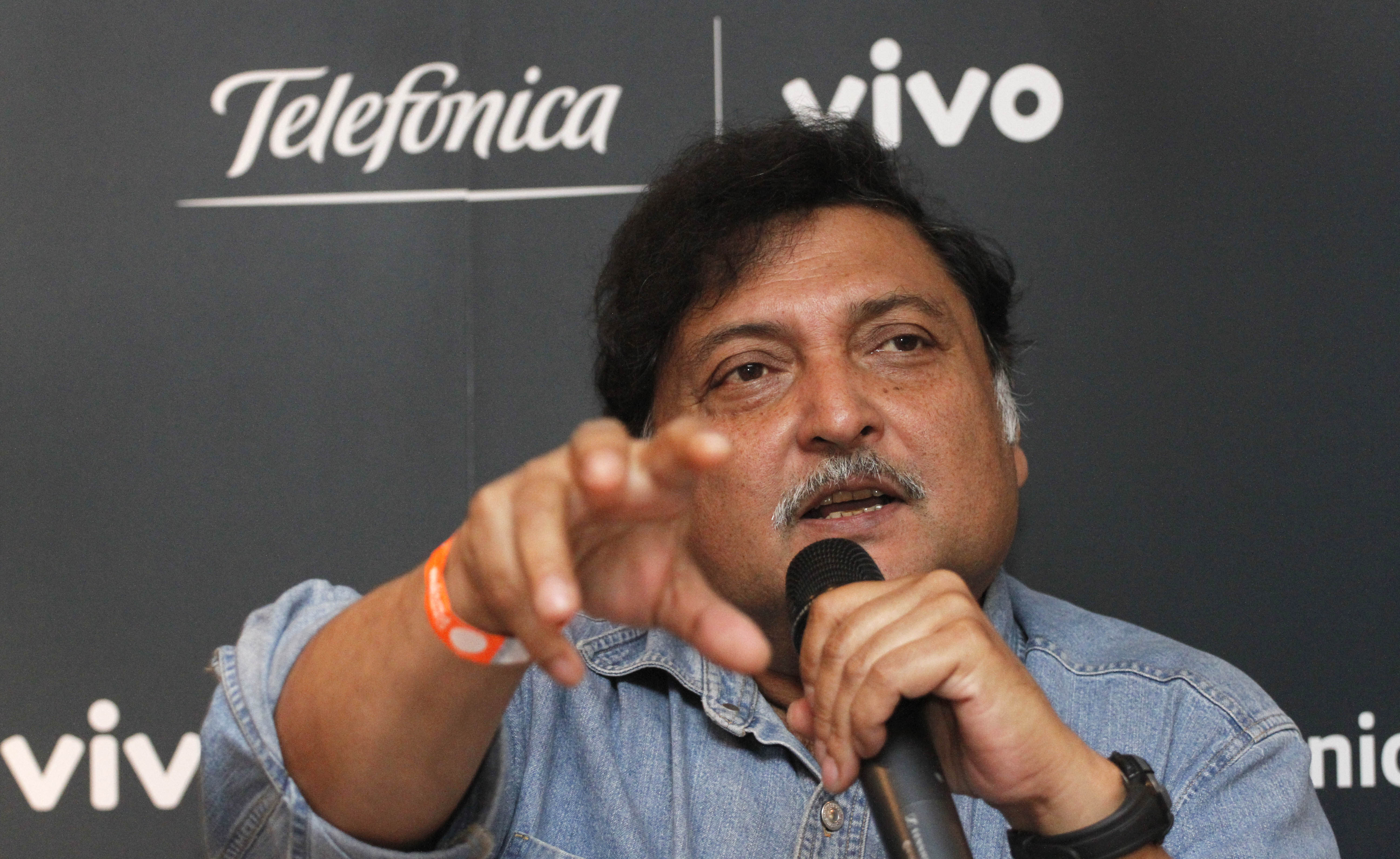 Entrevista Coletiva com Sugata Mitra - 07/02/2012 - foto: Flávia de Quadros/indicefoto.com